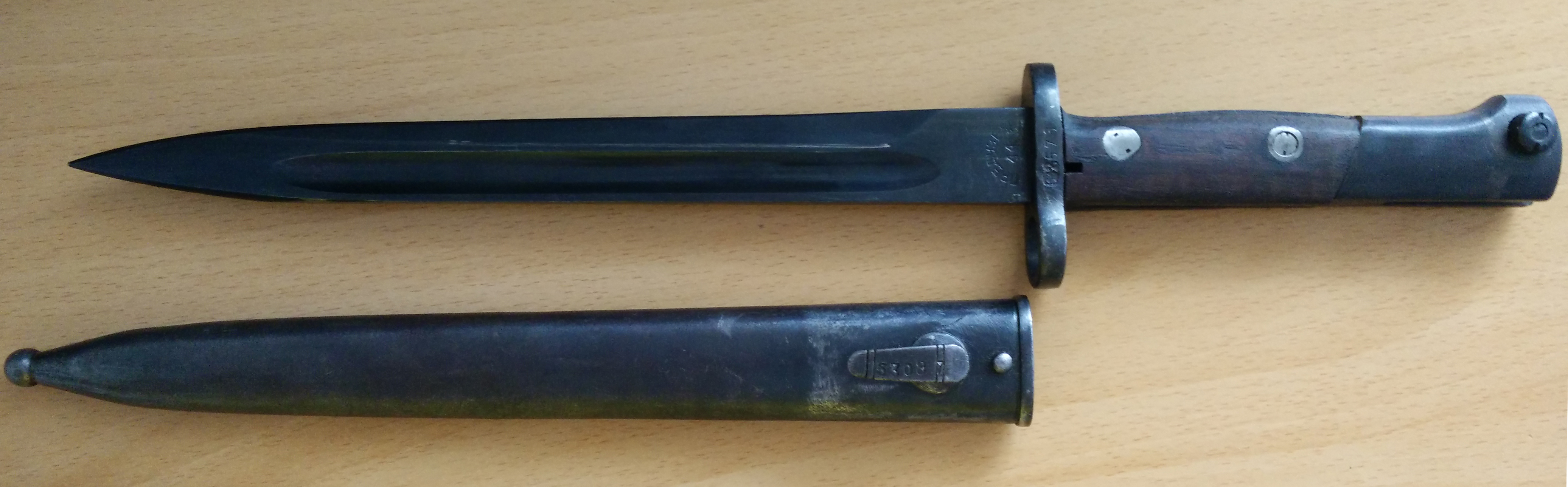 Bajonet in nožnica za jugoslovansko puško M.48 sistema Mauser.